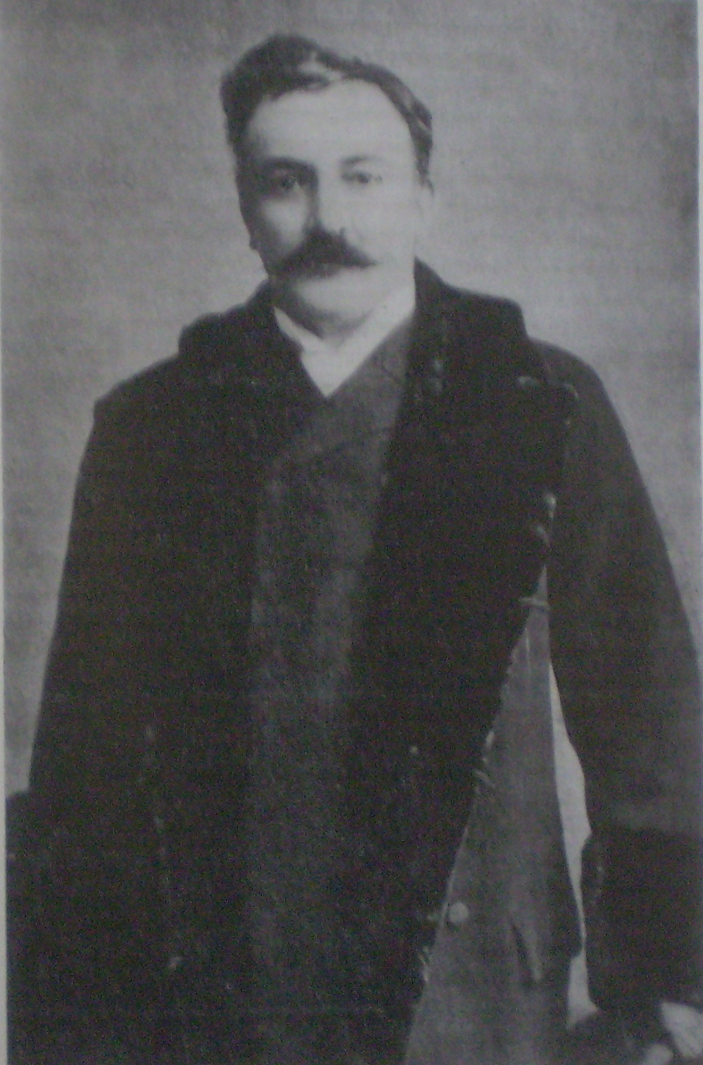 Roque Sáenz Peña, fotografía tomada el día de su boda